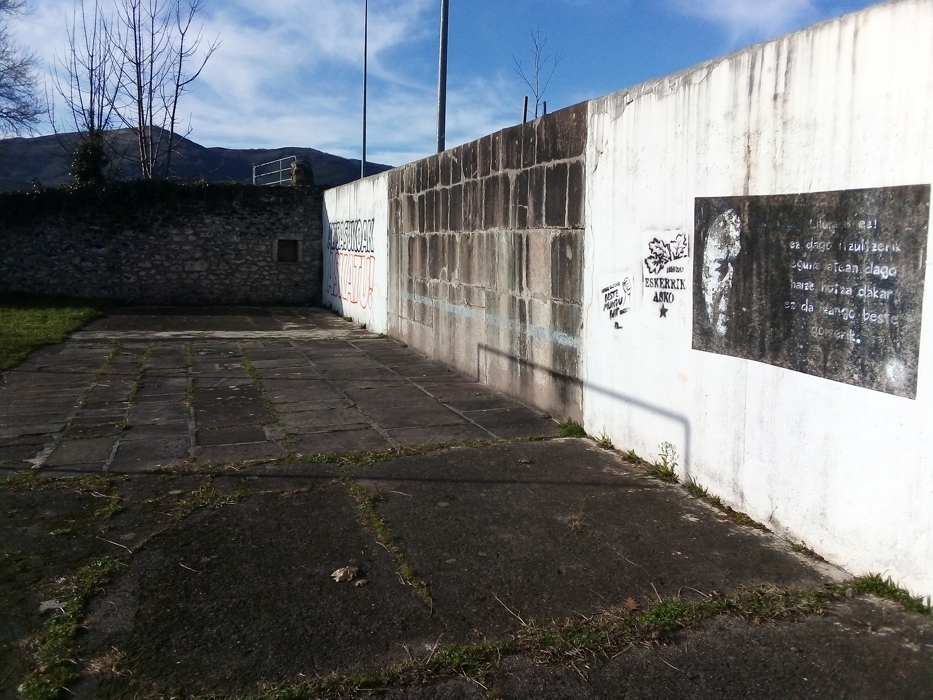 Lamiarrietako plaza. Errebote-pareta. Mikel Laboaren omenezko grafitia ere ageri da.